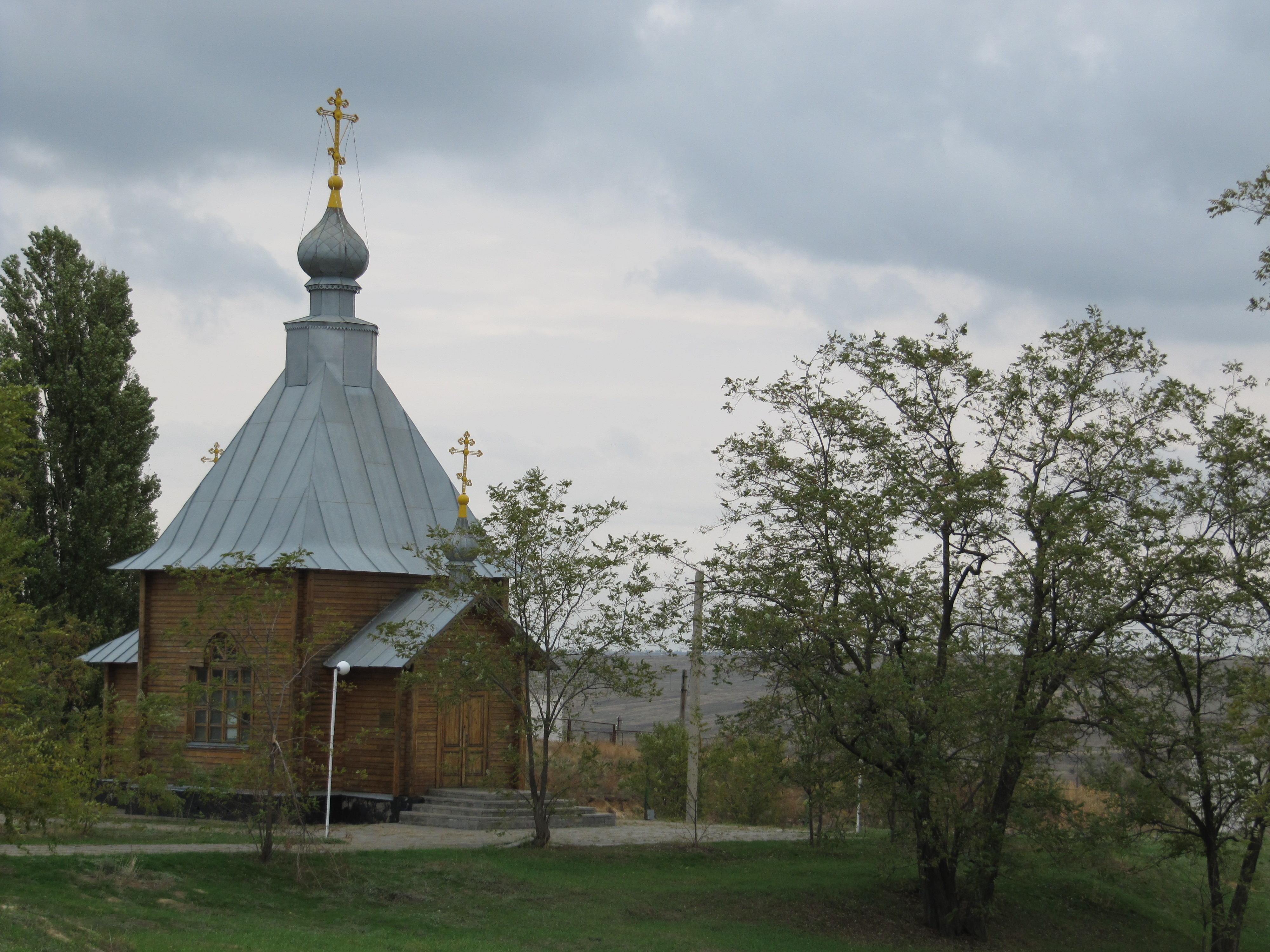 Часовня святого Георгия Победносца, Элиста, Калмыкия